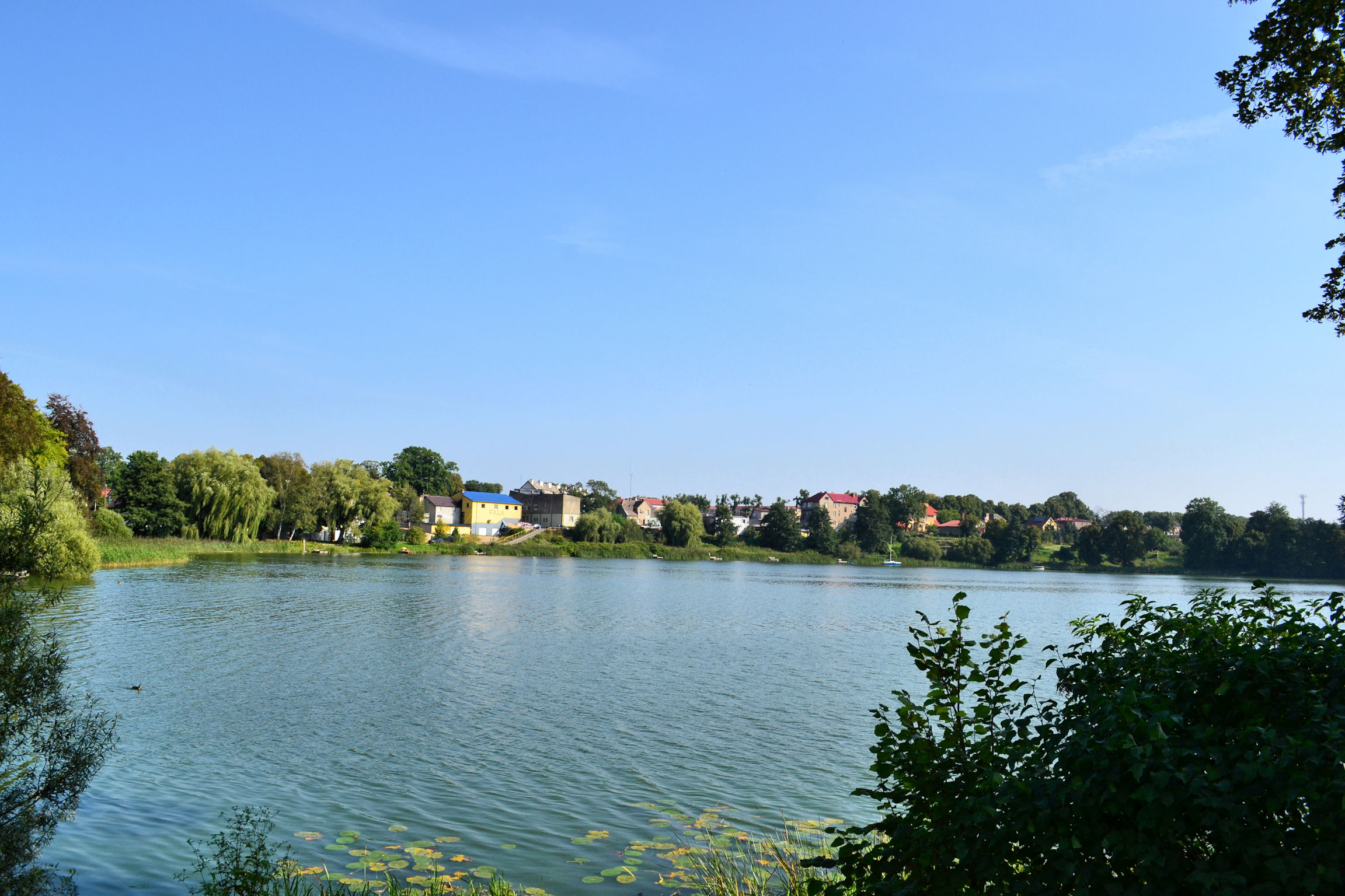 Jezioro Starzyca oraz zabudowania Chociwla